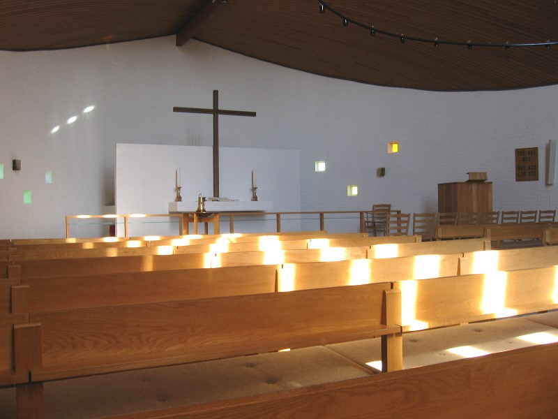 Inside Strandby Kirke